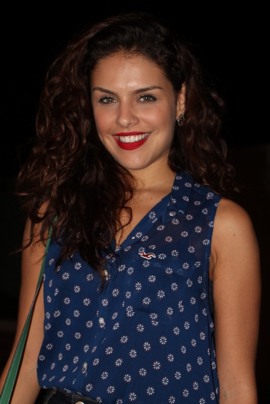 Paloma Bernarde-001